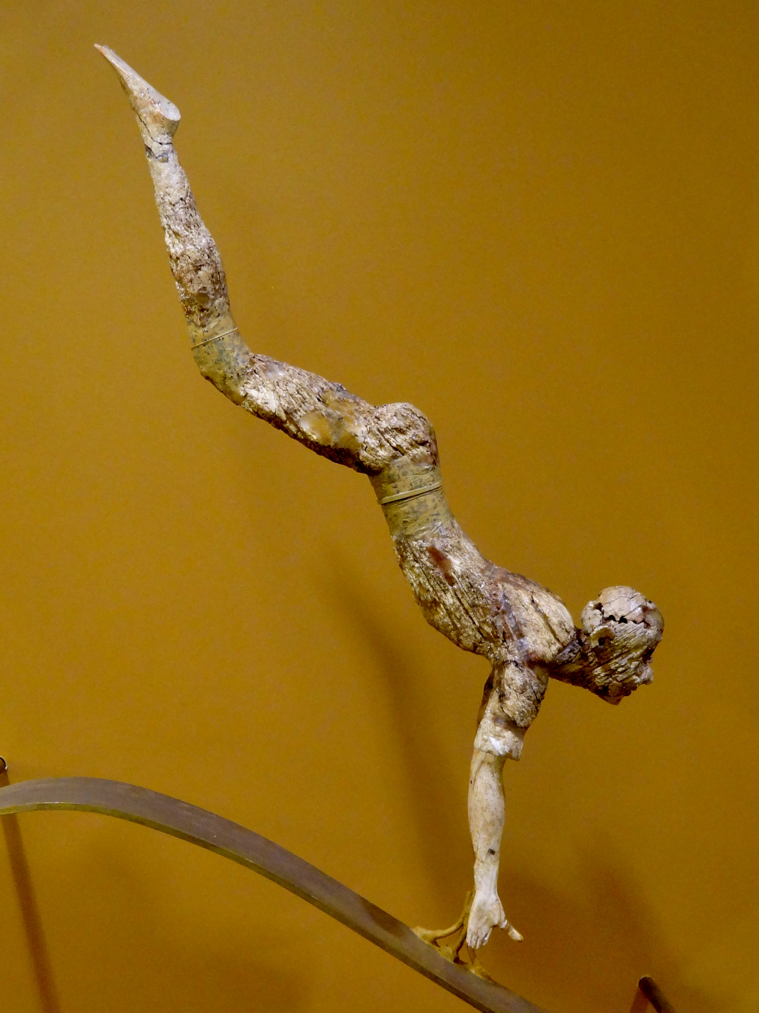 Elfenbeinstatuette eines Stierspringers oder Akrobaten, Teil einer mehrfigurigen Gruppe aus Knossos, ausgestellt im Archäologischen Museum Iraklio, Kreta, Griechenland